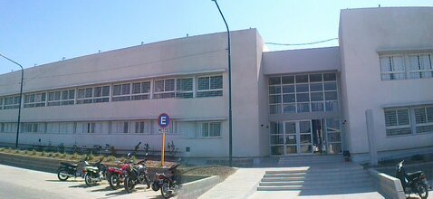 Edificio nuevo del ISP N° 2 "J.V. Gonzalez" de Raaela